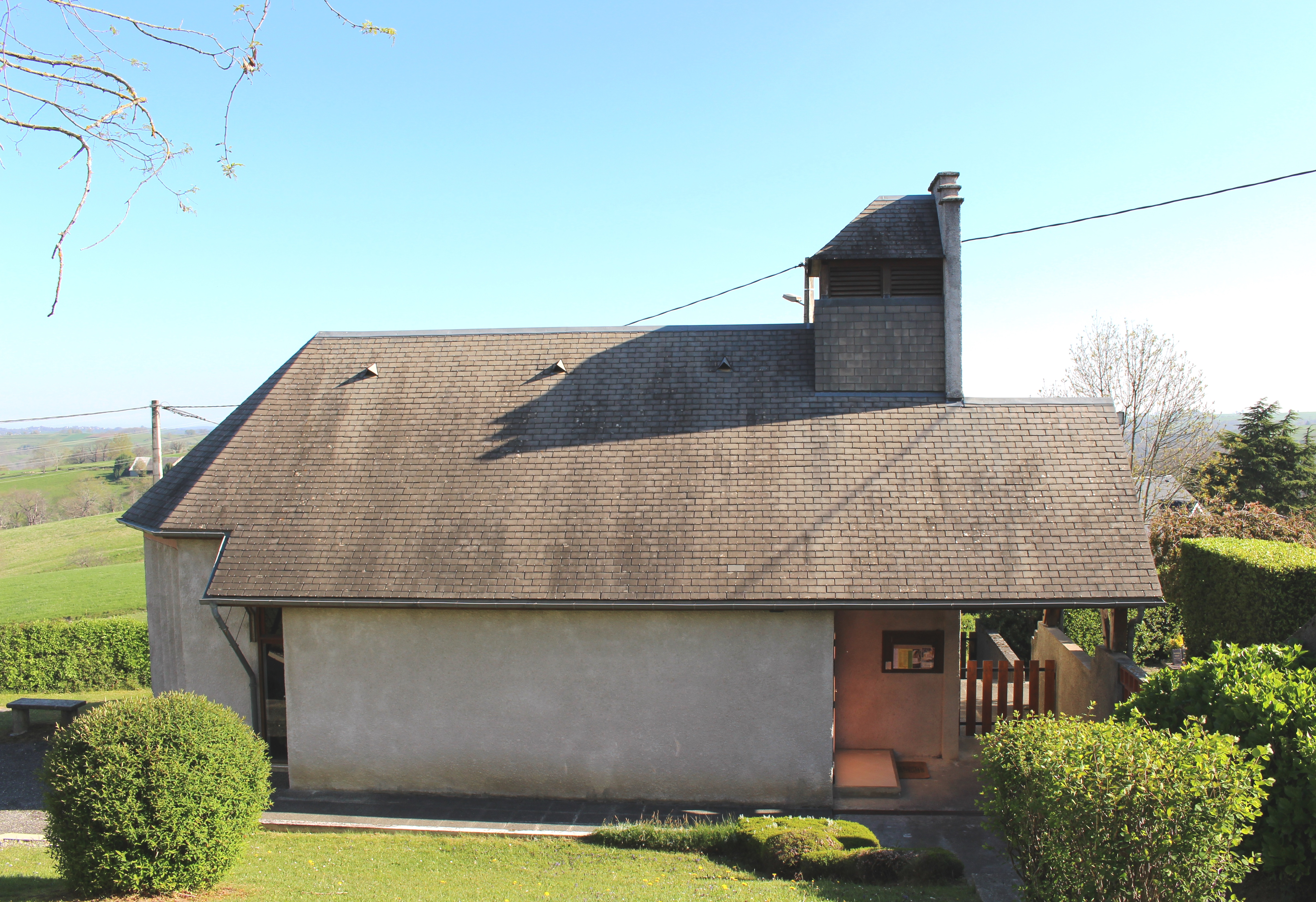 Église Sainte-Bernadette de Hauban (Hautes-Pyrénées)